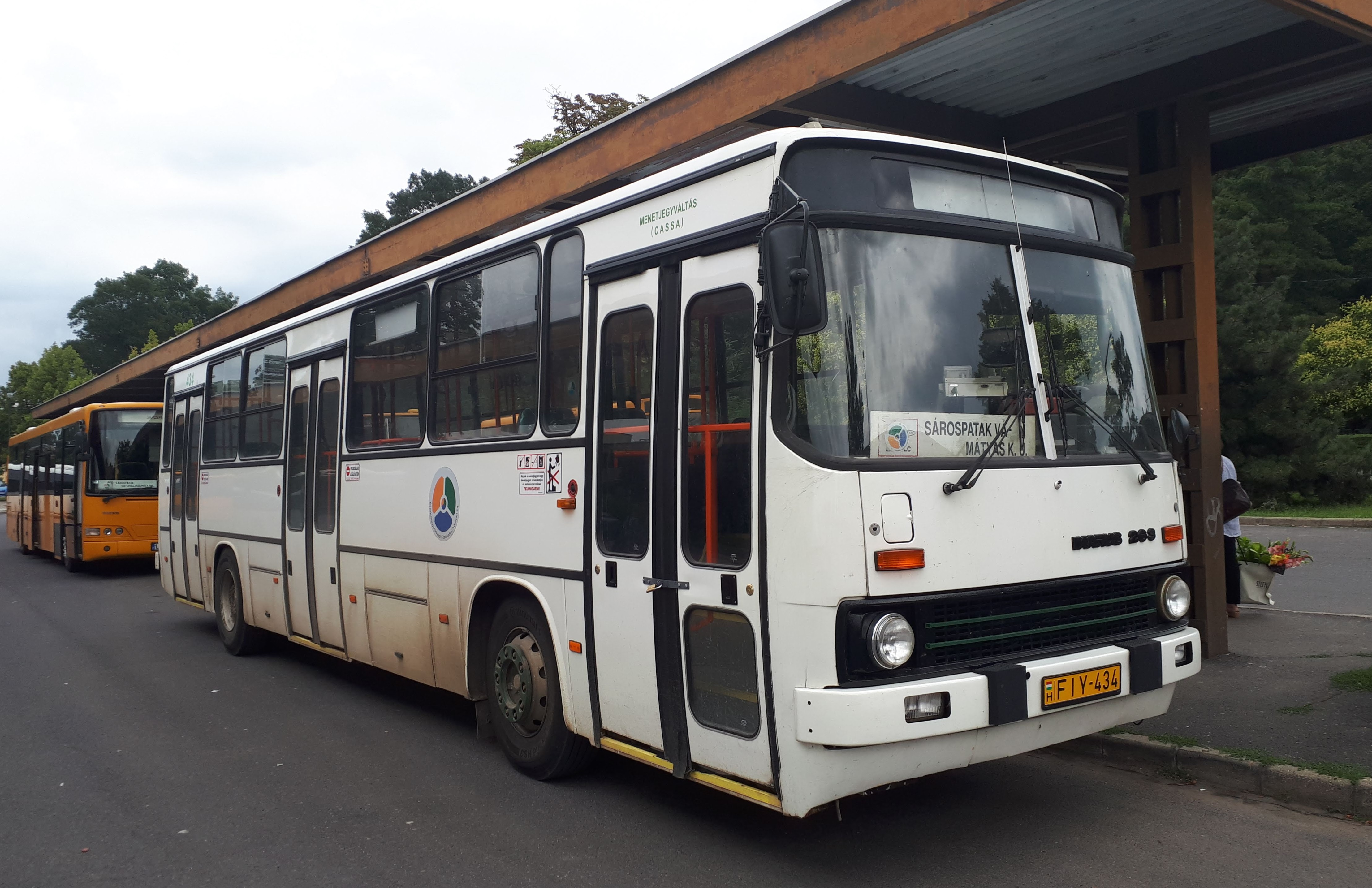 Az ÉMKK FIY-434 rendszámú Ikarus 263 típusú busza Sárospatakon, a 3885-ös helyközi járaton.